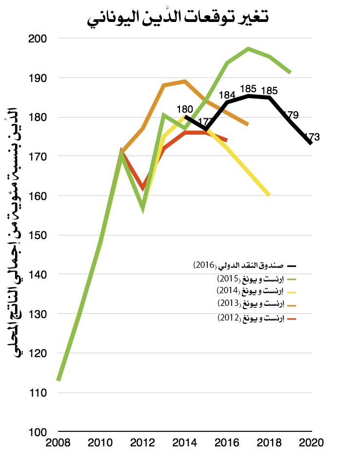 Projections of Greek governmental debt in percent of GDP (2008-2020)